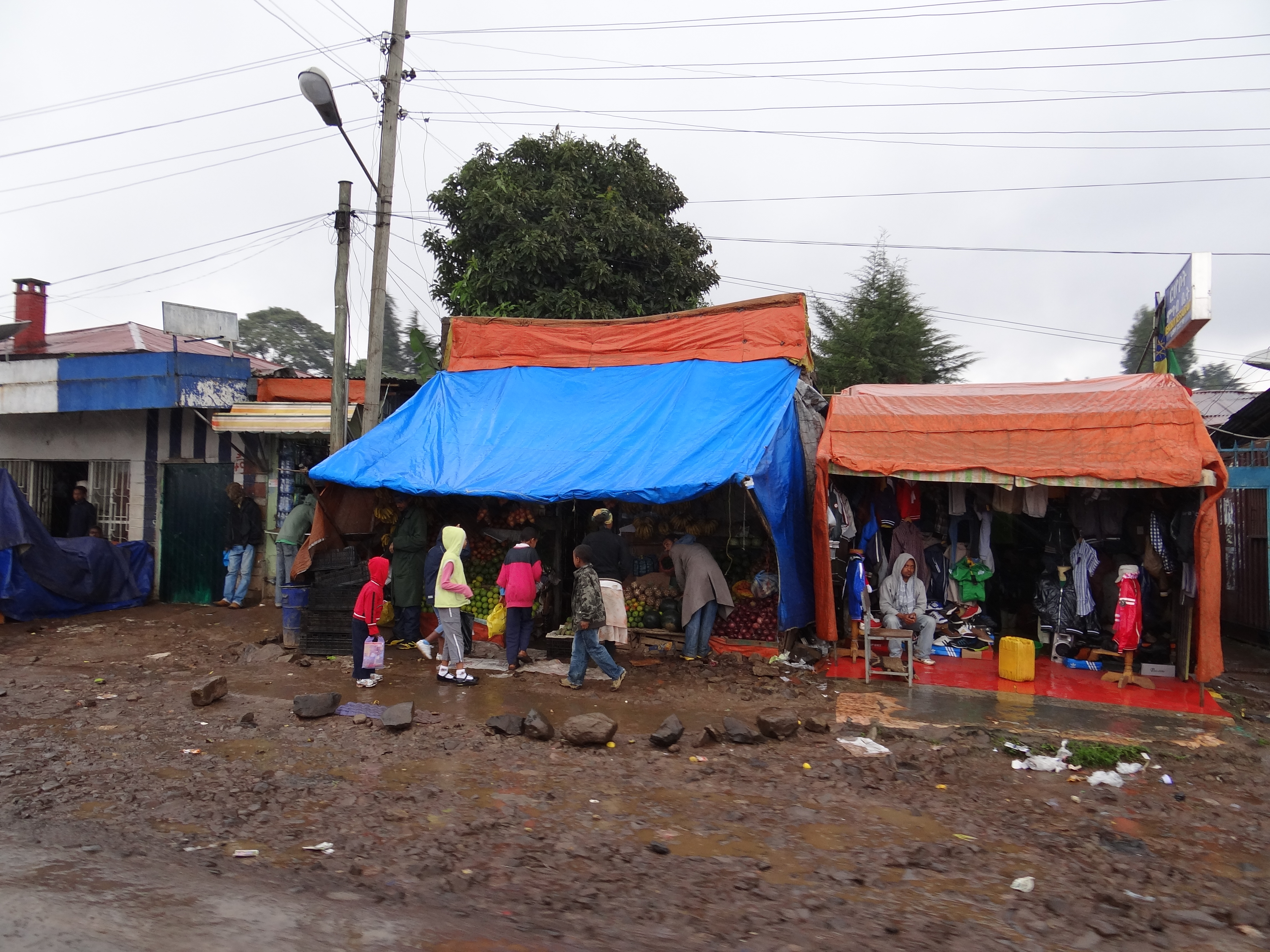 Addis, Ethiopia